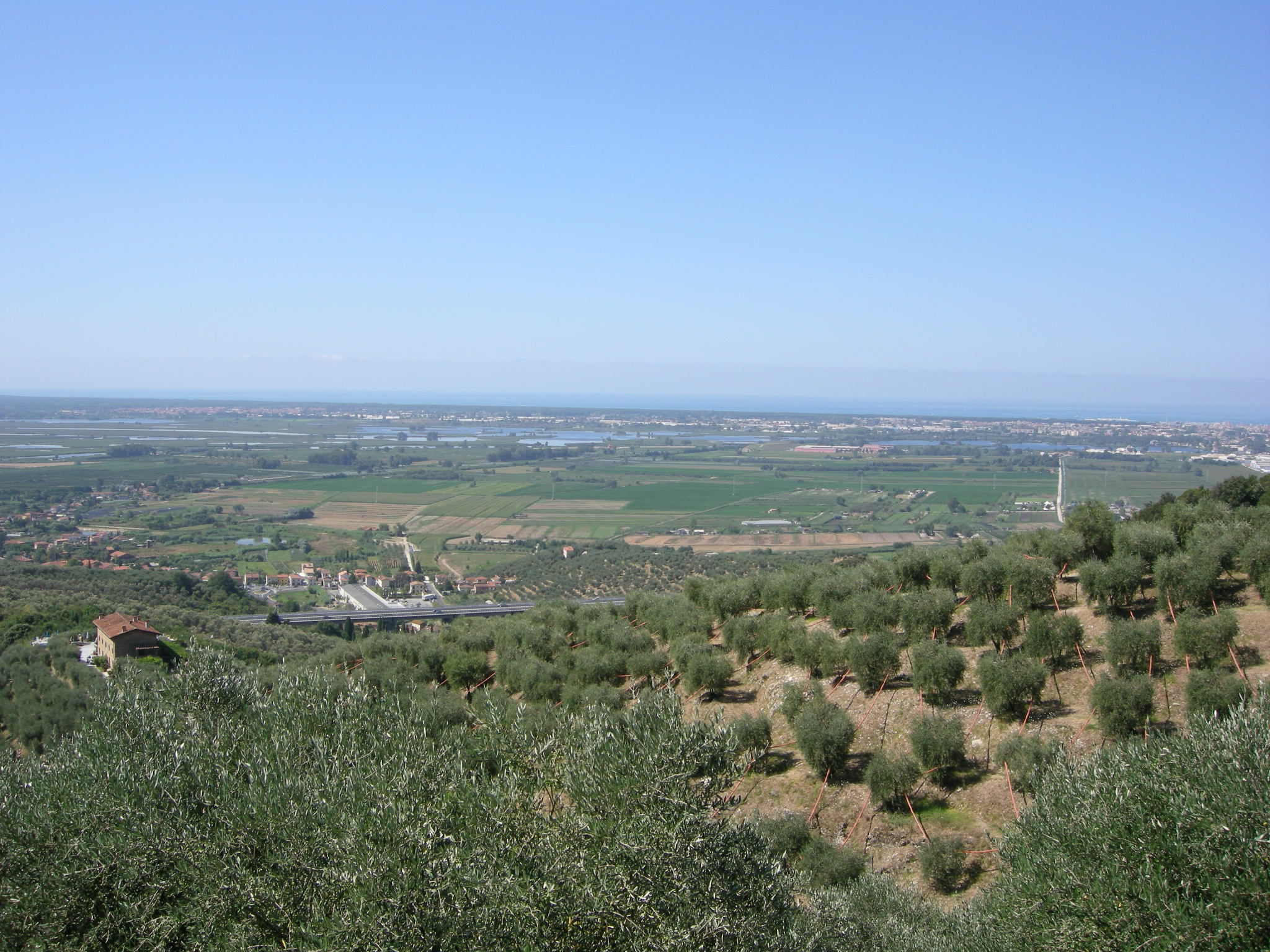 Massarosa, view